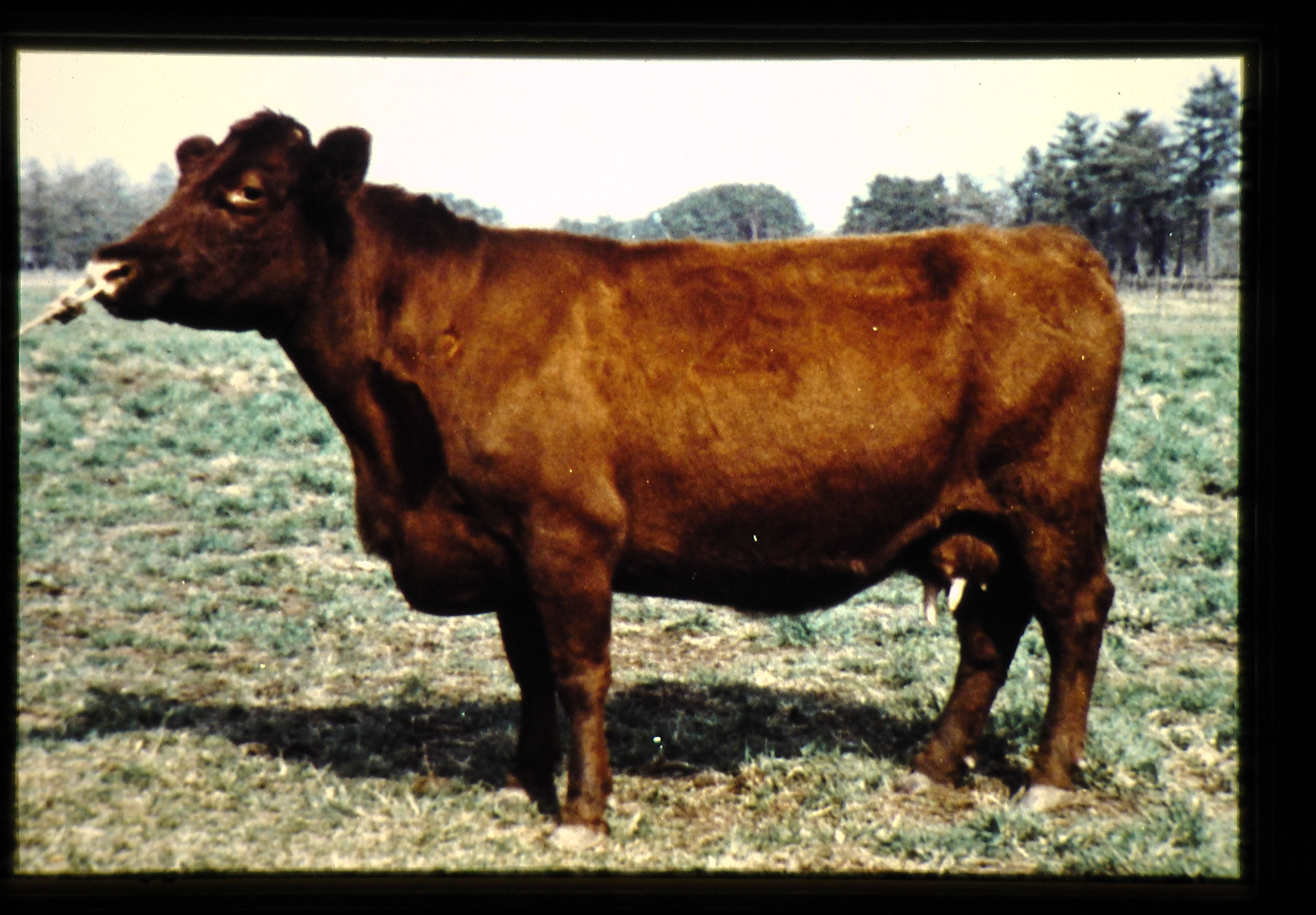 JIRCAS Photo Archive Author: 奥羽種畜牧場 Description: 毛色は濃赤褐色で、そけい部に白斑のあるものもある。鼻鏡、蹄は肉色。角は側上内方へのびる。中躯は長く、体積があるが，後躯は乏しい。中型でやや小さく，体重は♀500kg、体高は♀128kg、肉役体型比率は7:3｡ Country: 日本 (Japan) Keywords: 日本,青森,岩手,秋田,北海道,畜産 Slide no. 01-064-08 本コンテンツは、政府標準利用規約第2.0版(クリエイティブ・コモンズ 表示 4.0 国際 ライセンス（CC BY）互換)に基づき、出典を明記の上で利用できます。利用条件の内容については「 JIRCAS Webサイトの利用について 」をご参照ください。 印刷物、調査研究等でご利用頂いた場合は、 お問い合わせフォーム にてお知らせ頂ければ幸いです（任意） This content is provided under the terms and conditions of the JIRCAS Website Terms of Use or Creative Commons Attribution 4.0 International (CC BY 4.0) license.